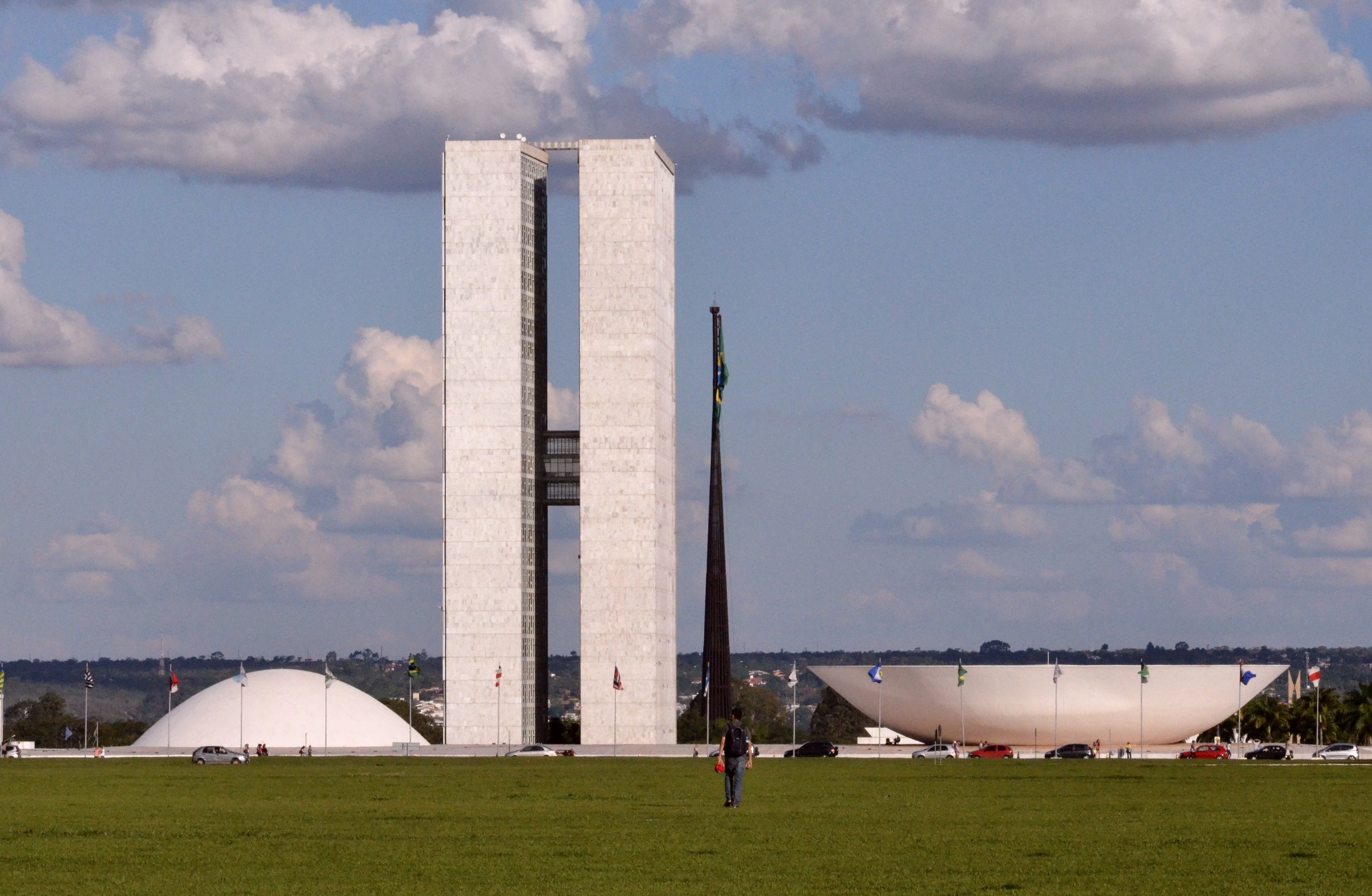 Congresso Nacional do Brasil, em Brasília.